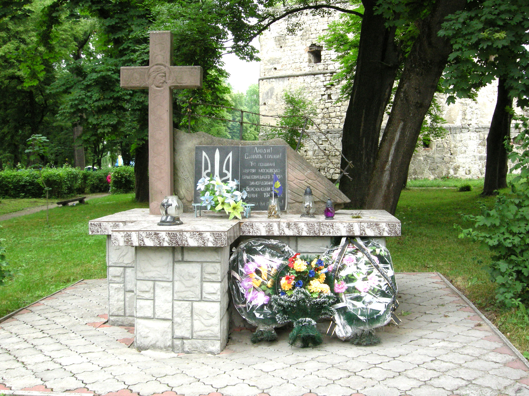 Братська могила жертв тоталітарного режиму, закатованих у Бережанській тюрмі, паркова зона м. Бережани Тернопільської області.